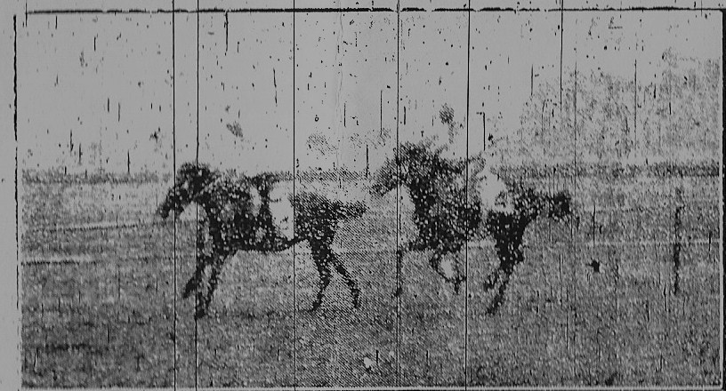 明治44年4月25日に宮城県で行われた競馬の写真です。明治44年4月27日に河北新報にて公表。